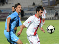 Pavle Sušić, zrinjski midfielder